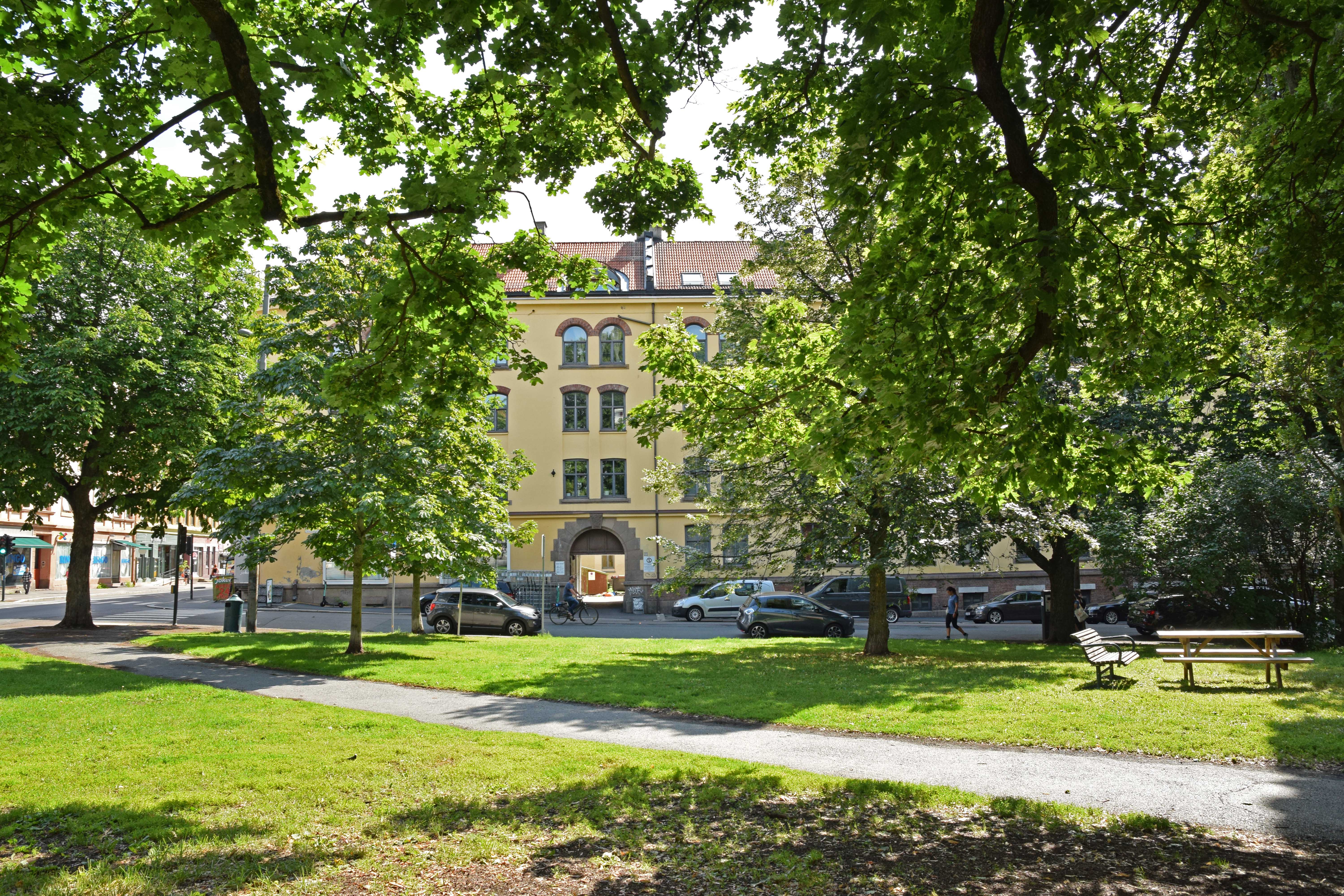 Sagene kirkepark på Sagene i Oslo med leiegården Dannevigsveien 7 og Grimstadgata i bakgrunnen. Arendalsgata til venstre.